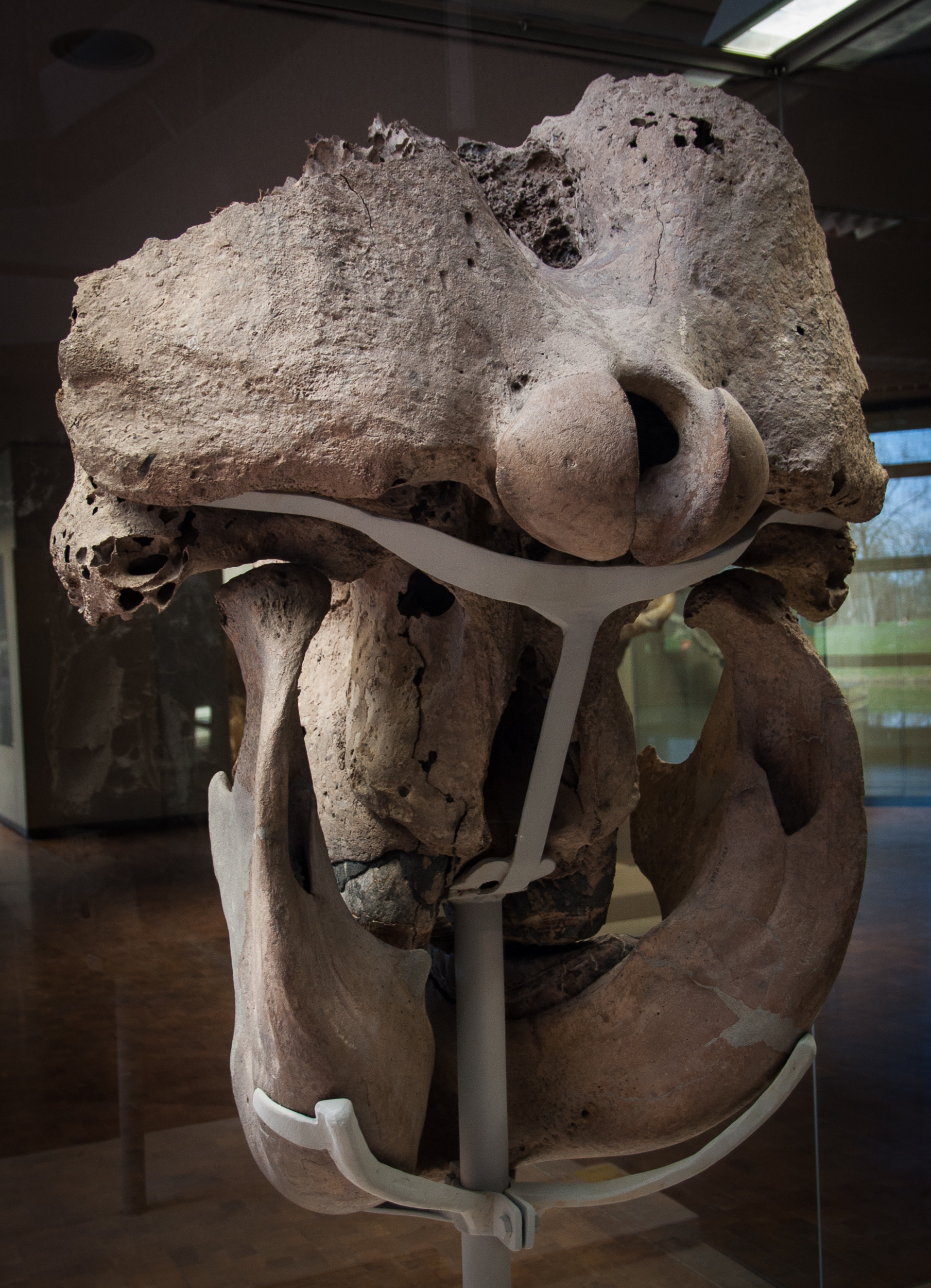 Kopfgelenk am Schädel eines europäischen Waldelefanten aus dem Mittelpleistozän. Exponat im Museum am Löwentor in Stuttgart.